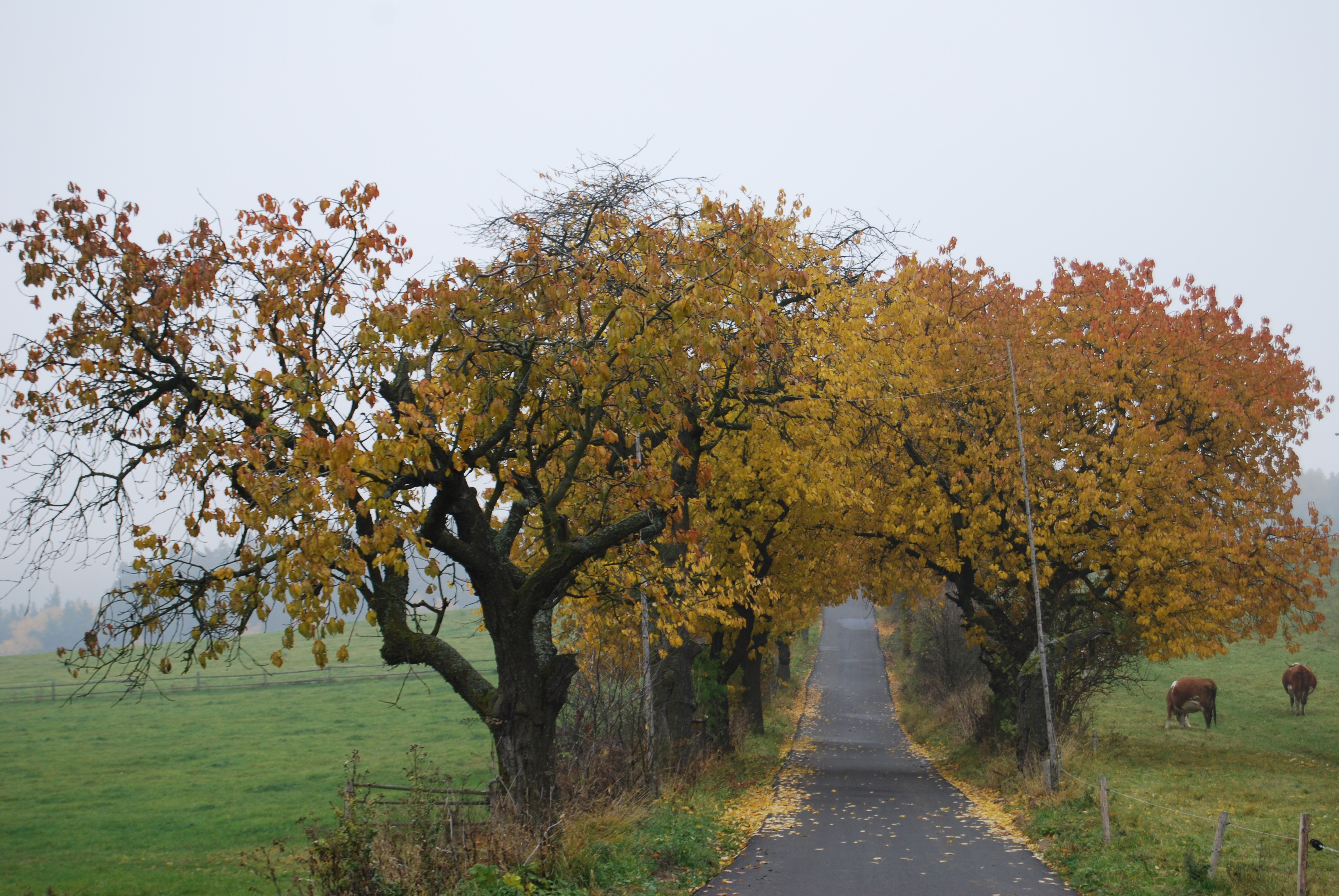 Pohled okolo rozhledny. Čestice. Okres Strakonice. Česko.